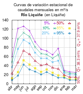 Curvas de variación estacional del río Liquiñe en Liquiñe. # Dirección General de Aguas # Diagnóstico y clasificación de los cursos y cuerpos de agua según objetivos de calidad. Cuenca del río Valdivia. # Santiago de Chile # Ministerio de Obras Públicas (Chile) # 2004 # url: # urlarchivo: # Tabla 4.3: Río Liquiñe en Liquiñe (m3/s), pág. 46 mes 5% 10% 20% 50% 85% 95% abr 59.04 47.76 36.94 22.61 12.35 8.66 may 121.91 98.82 76.64 47.12 25.89 18.21 jun 126.50 112.11 96.85 73.21 51.87 42.37 jul 116.65 103.77 89.33 65.36 42.27 31.76 ago 92.47 80.78 68.58 50.16 34.12 27.20 sep 76.39 66.47 56.13 40.51 26.64 20.34 oct 71.98 64.33 56.15 43.29 31.43 26.04 nov 63.73 55.95 47.77 35.33 24.36 19.58 dic 78.18 64.48 51.06 32.68 18.86 13.66 ene 29.83 26.99 24.02 19.55 15.57 13.76 feb 26.36 23.27 20.02 15.00 10.52 8.54 mar 25.39 22.52 19.47 14.74 10.47 8.56 This plot was created with Gnuplot.